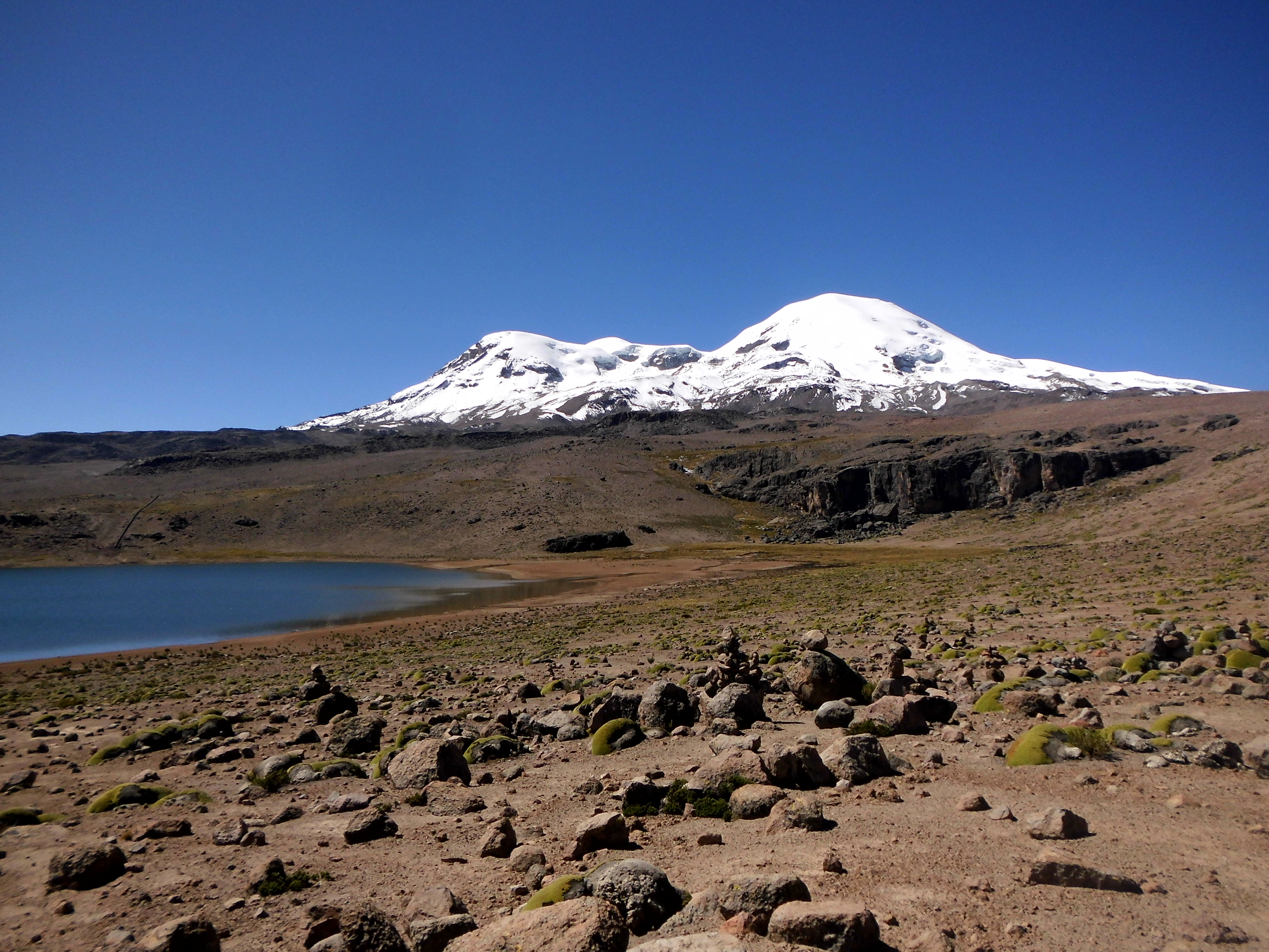 COROPUNA LAKE